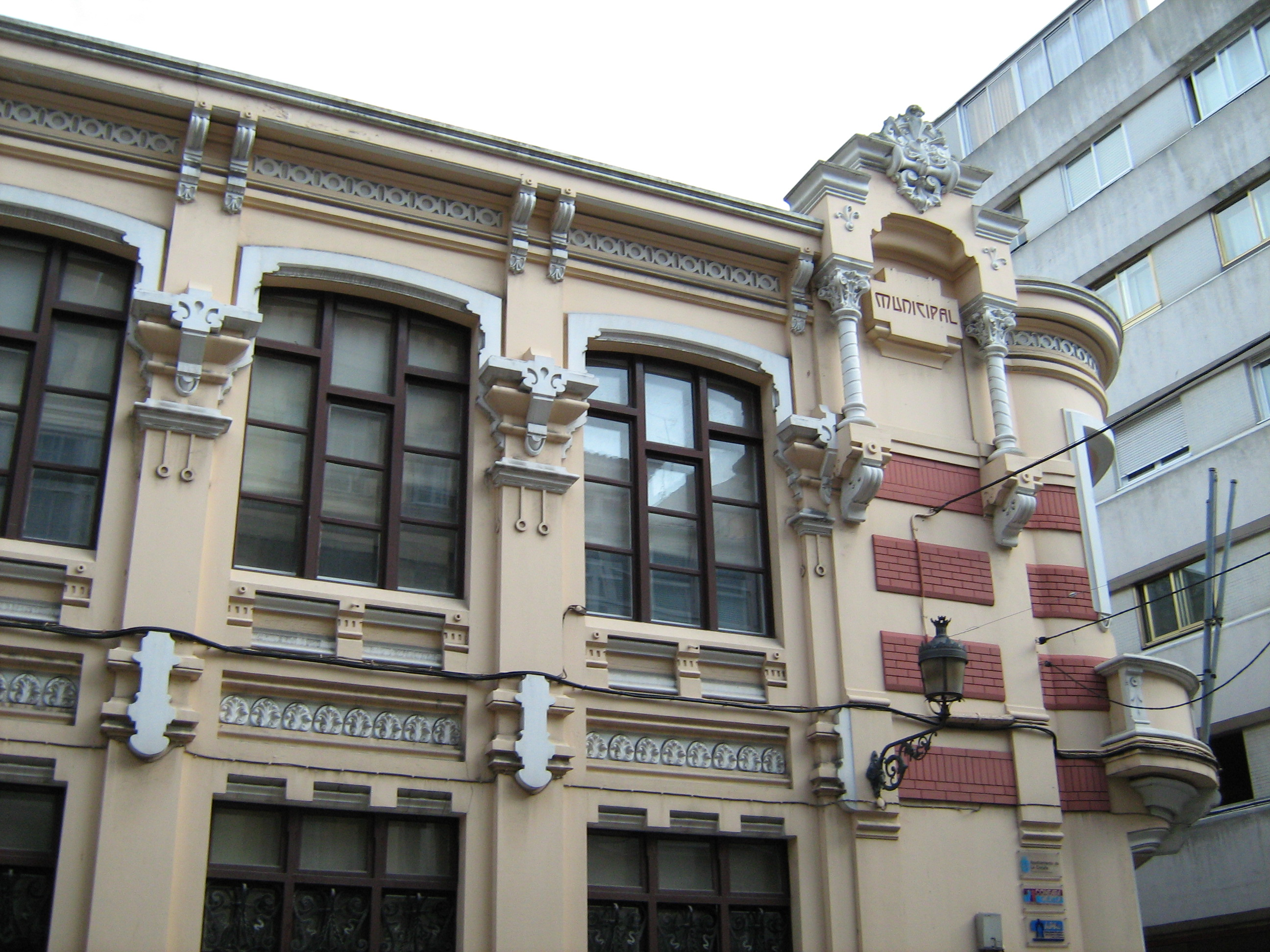 Antigas escolas municipais, da Coruña, de Pedro Mariño